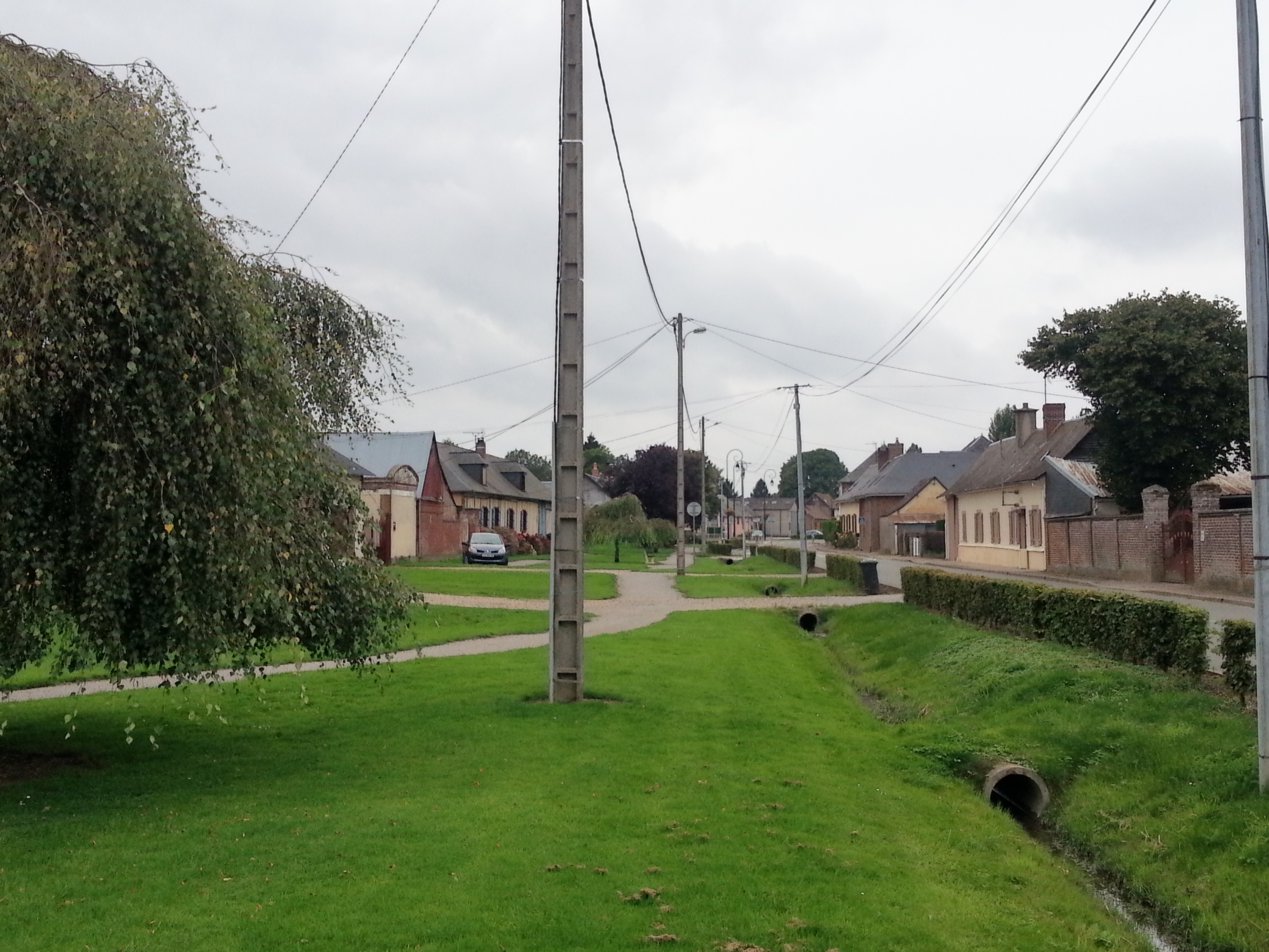 Vue générale de la grande rue de Romescamps